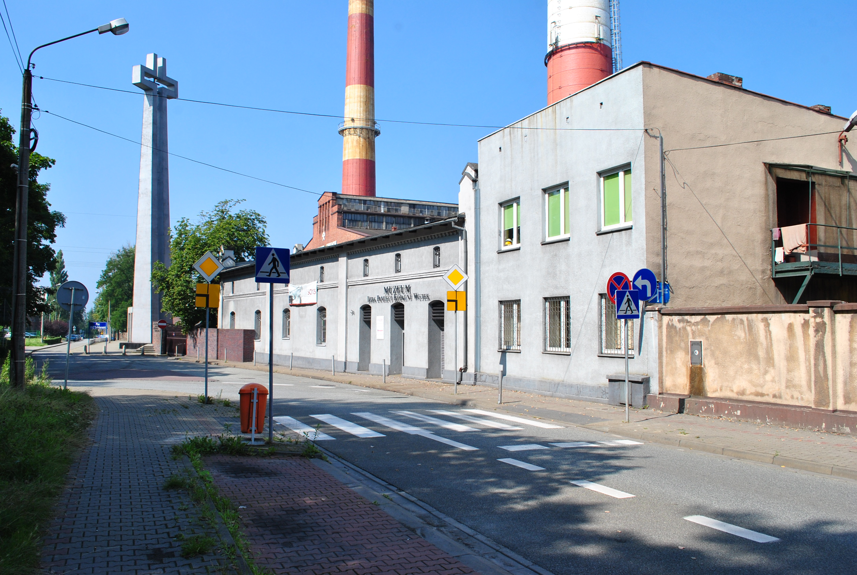 Katowice - Brynów. Muzeum - Izba Pamięci Kopalni Wujek w Katowicach